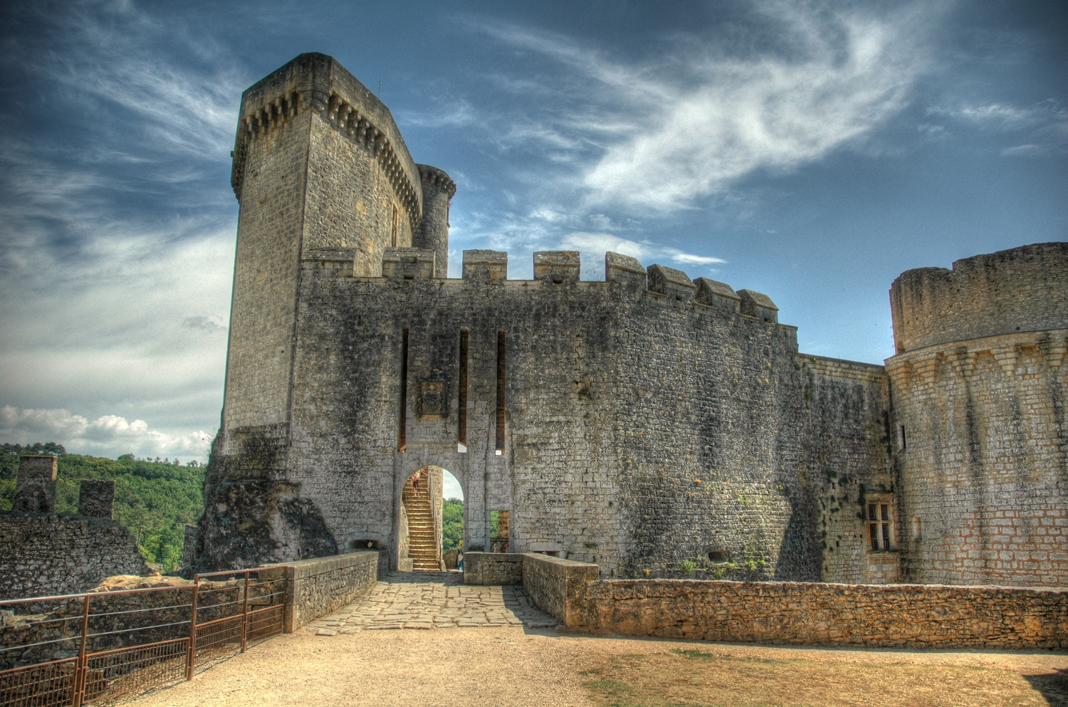 Château de Bonaguil, Saint Front sur Lémance, Lot-et-Garonne .